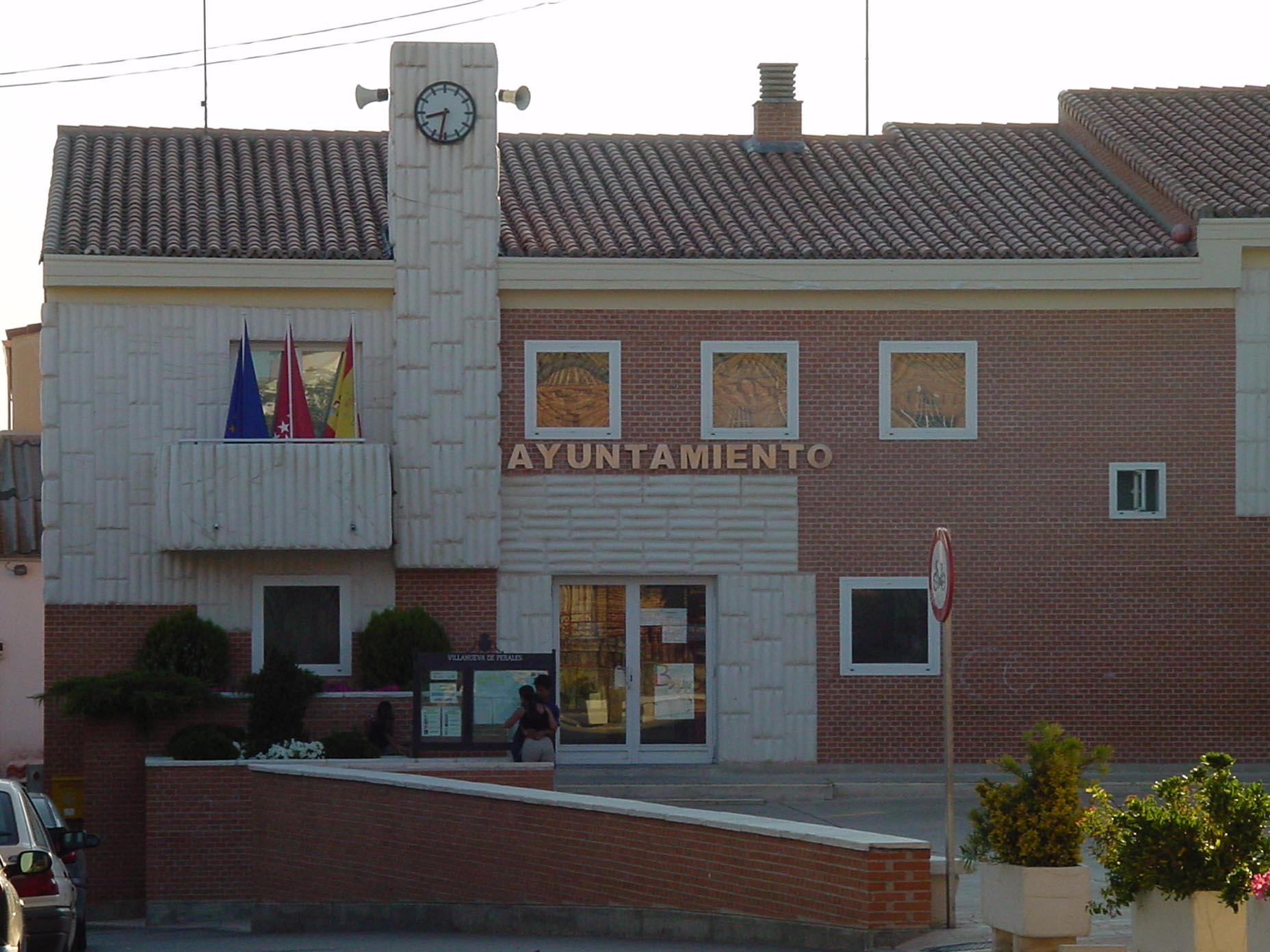 Ayuntamiento de Villanueva de Perales.